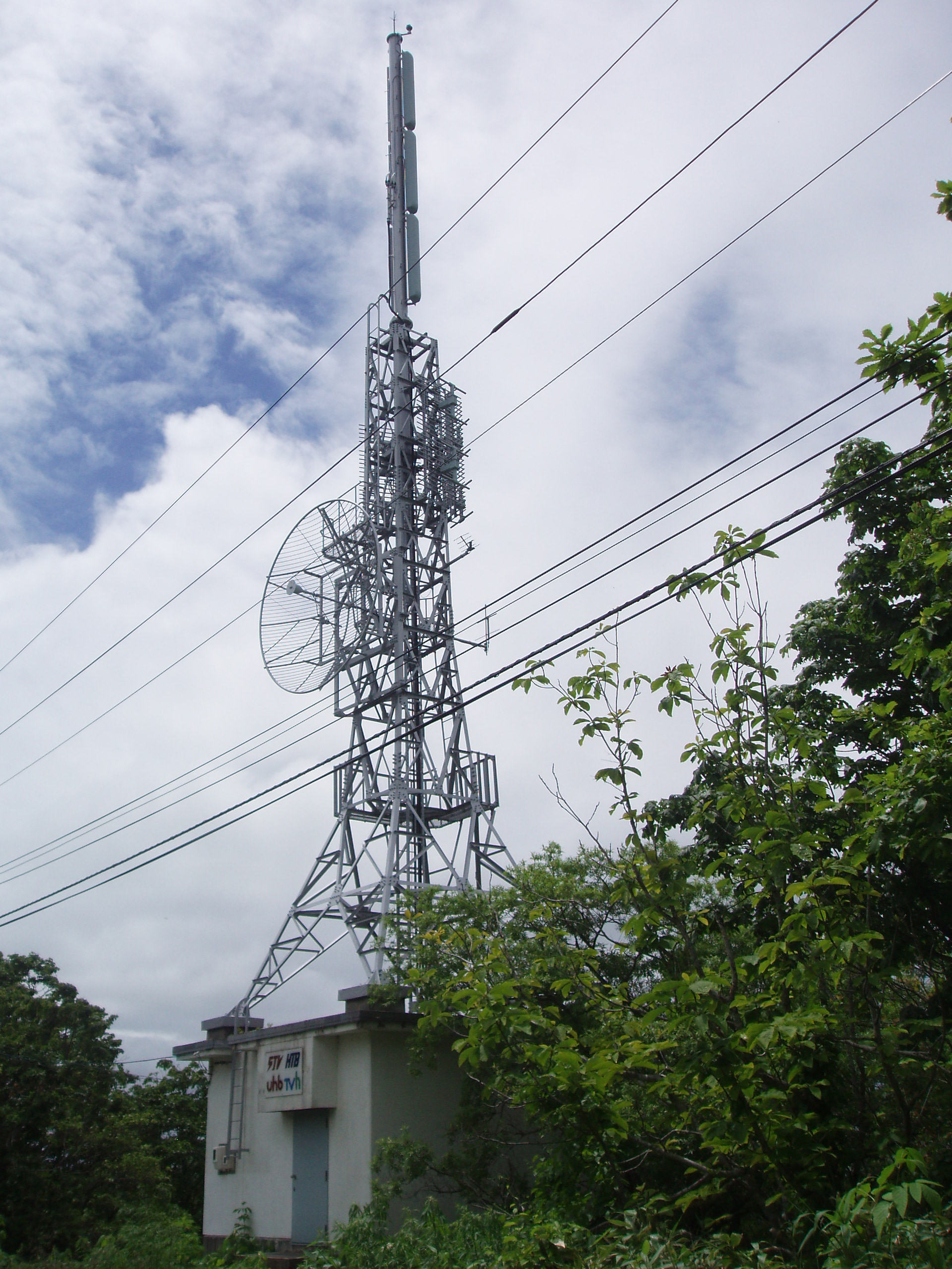 留萌テレビ中継局 STV・HTB・UHB・TVh送信設備